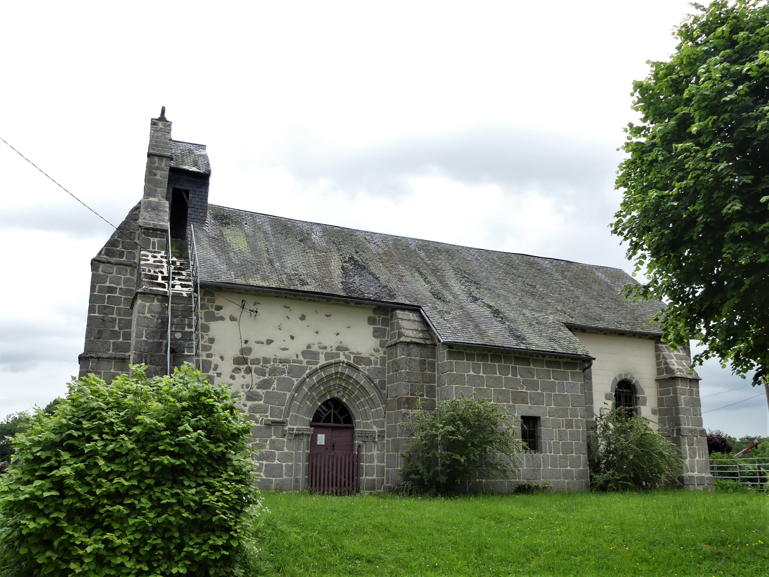 L'église de Malleret, Creuse, France.